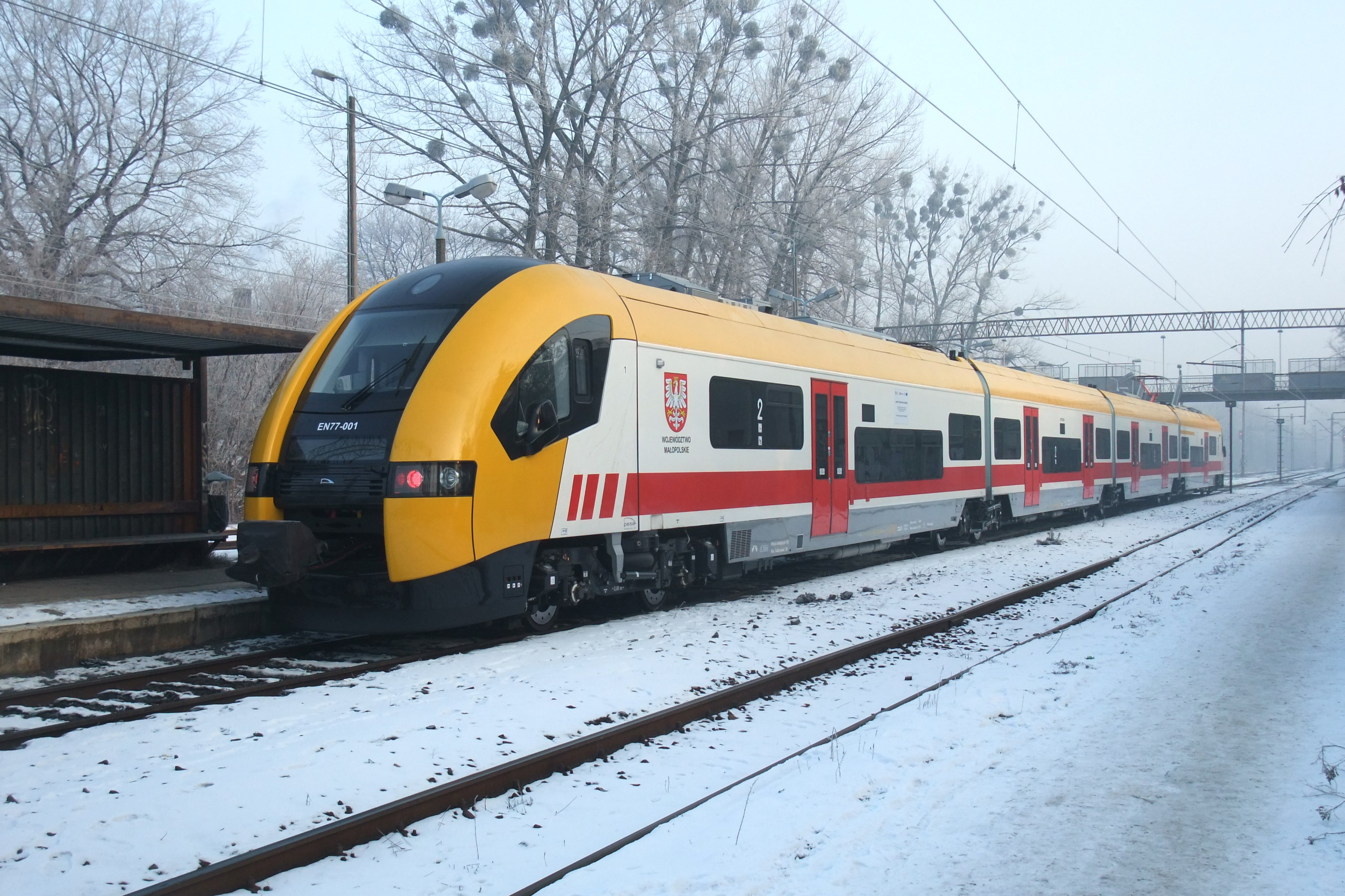 elektryczny zespół trakcyjny EN77 (oznaczenie wg schematu PKP) / 32WE Acatus II (oznaczenie producenta - PESA) numerze czołowym 001 w barwach województwa małopolskiego, na stacji Chrzanów 1 lutego 2011 roku.